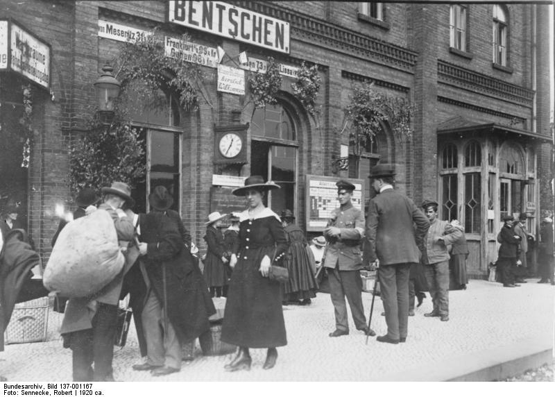 Bentschen, Ankunft deutscher Flüchtlinge aus Posen Ankunft deutscher Flüchtlinge aus Posen in Bentschen: Zoll- und Passrevision. [Bentschen, Deutscher Grenzbahnhof]